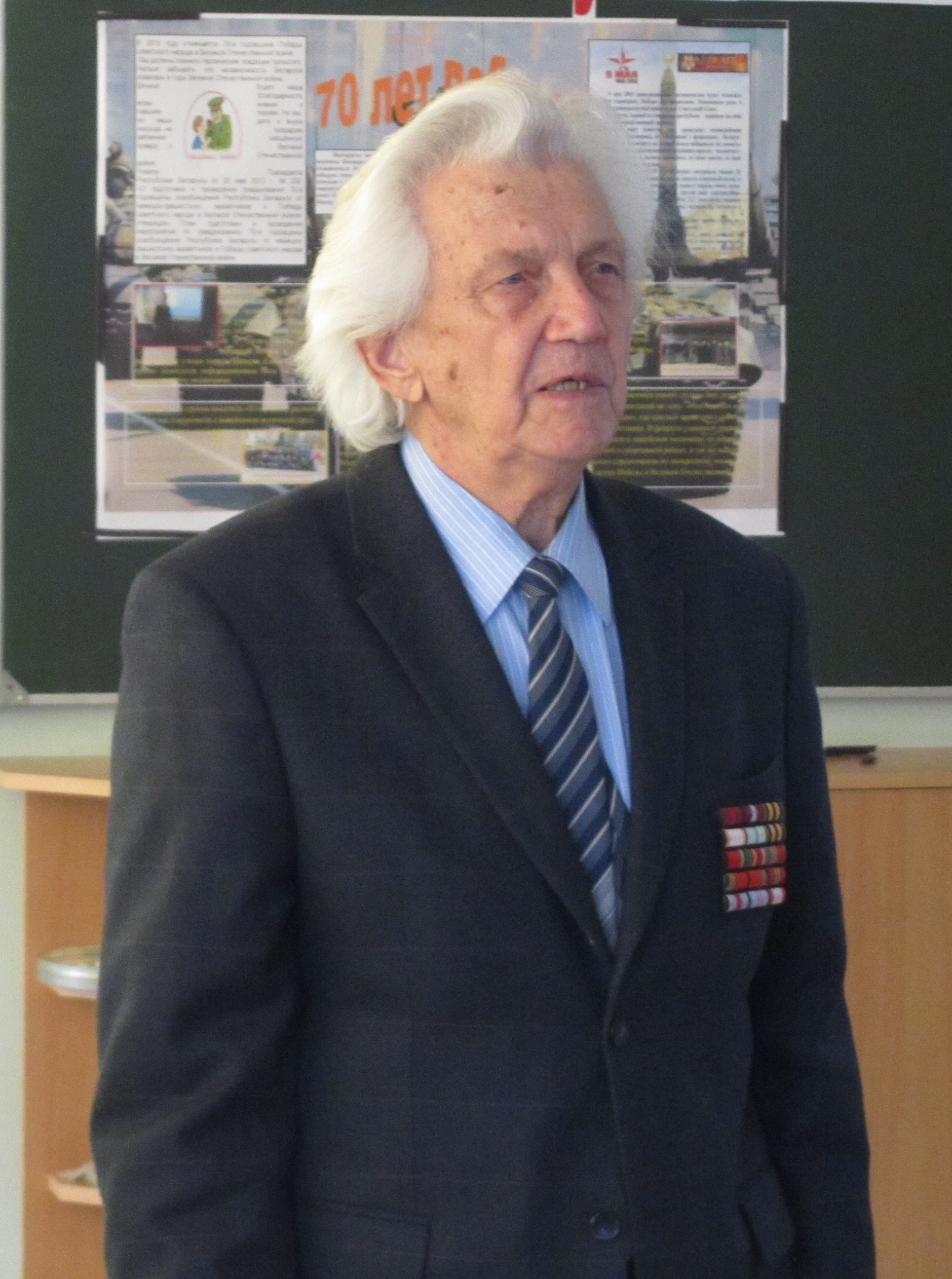 Беларуская (тарашкевіца): Алесь Савіцкі на мерапрыемстве Дзяржаўнага музэя гісторыі беларускай літаратуры "Жыцьцёвае поле Алеся Савіцкага". 14.04.2015